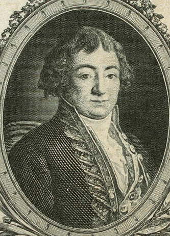 Cabarrus Espagne ministre Descendance de Jean de Fourcade Pays basque